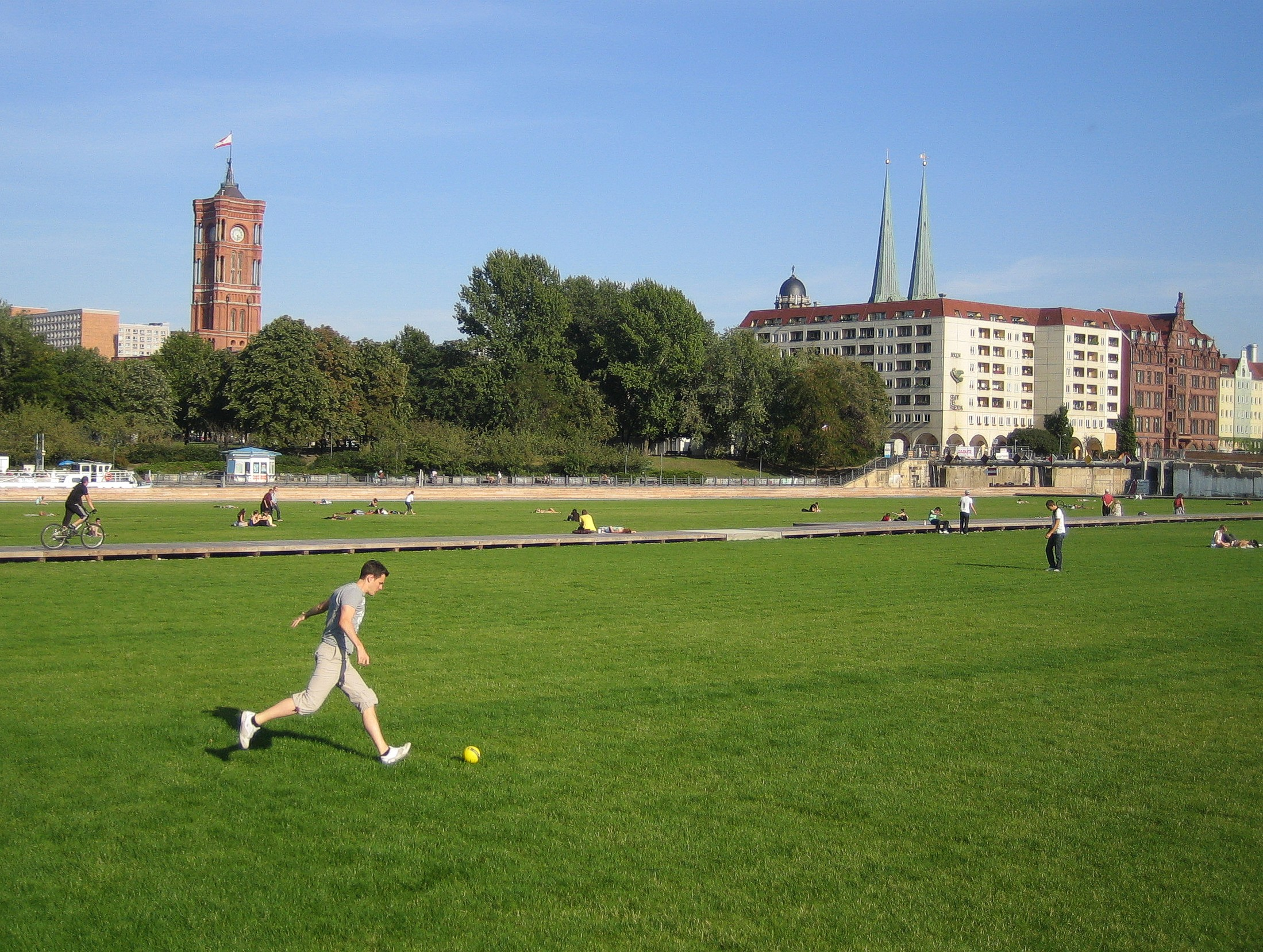 Berlin. Grundfläche des ehemaligen Palastes der Republik der DDR nach der Demontage. Zustand September 2009.